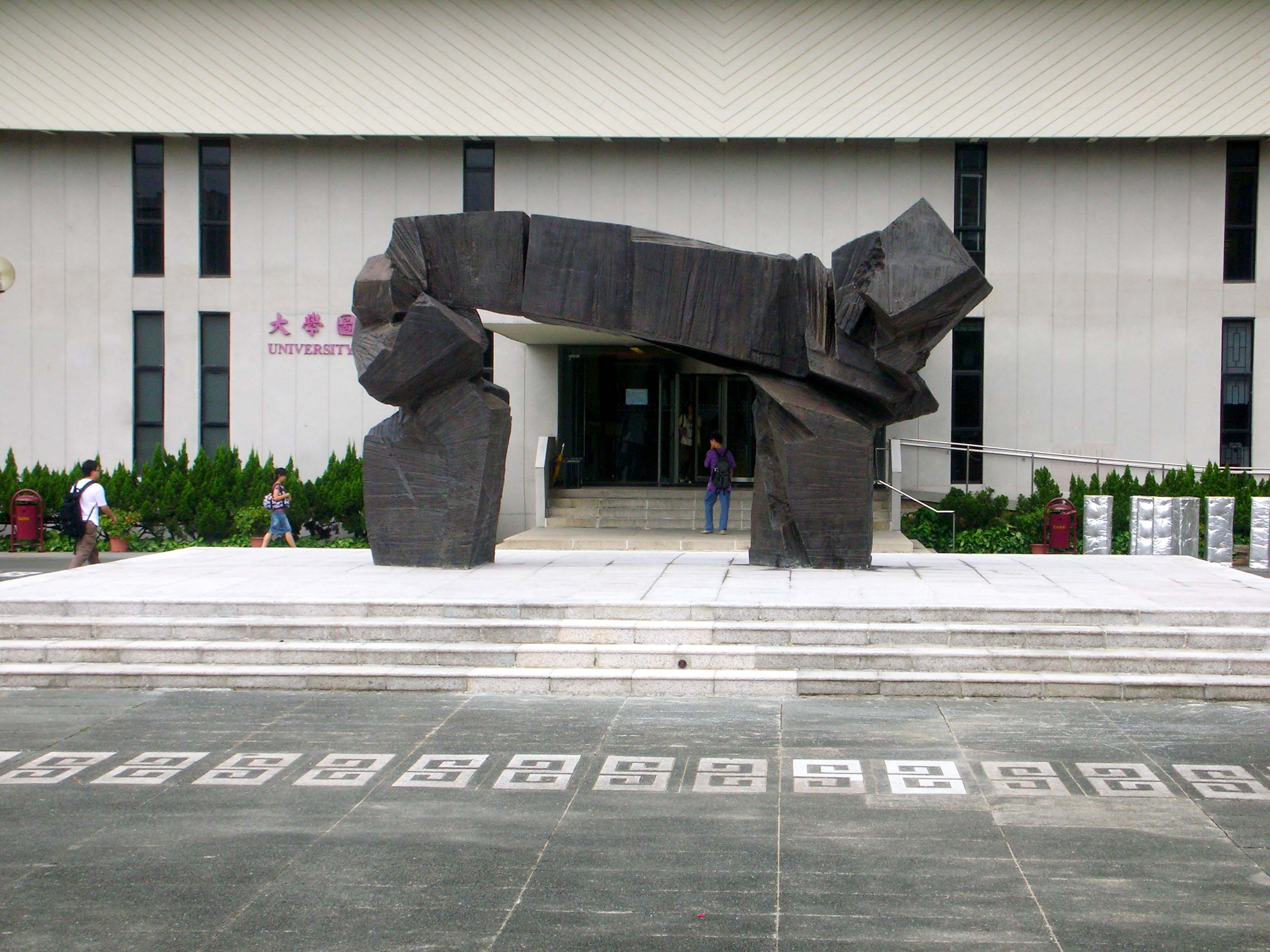 CUHK 香港中文大學百萬大道盡頭、大學圖書館外的雕塑「門」，俗稱「峰火台」